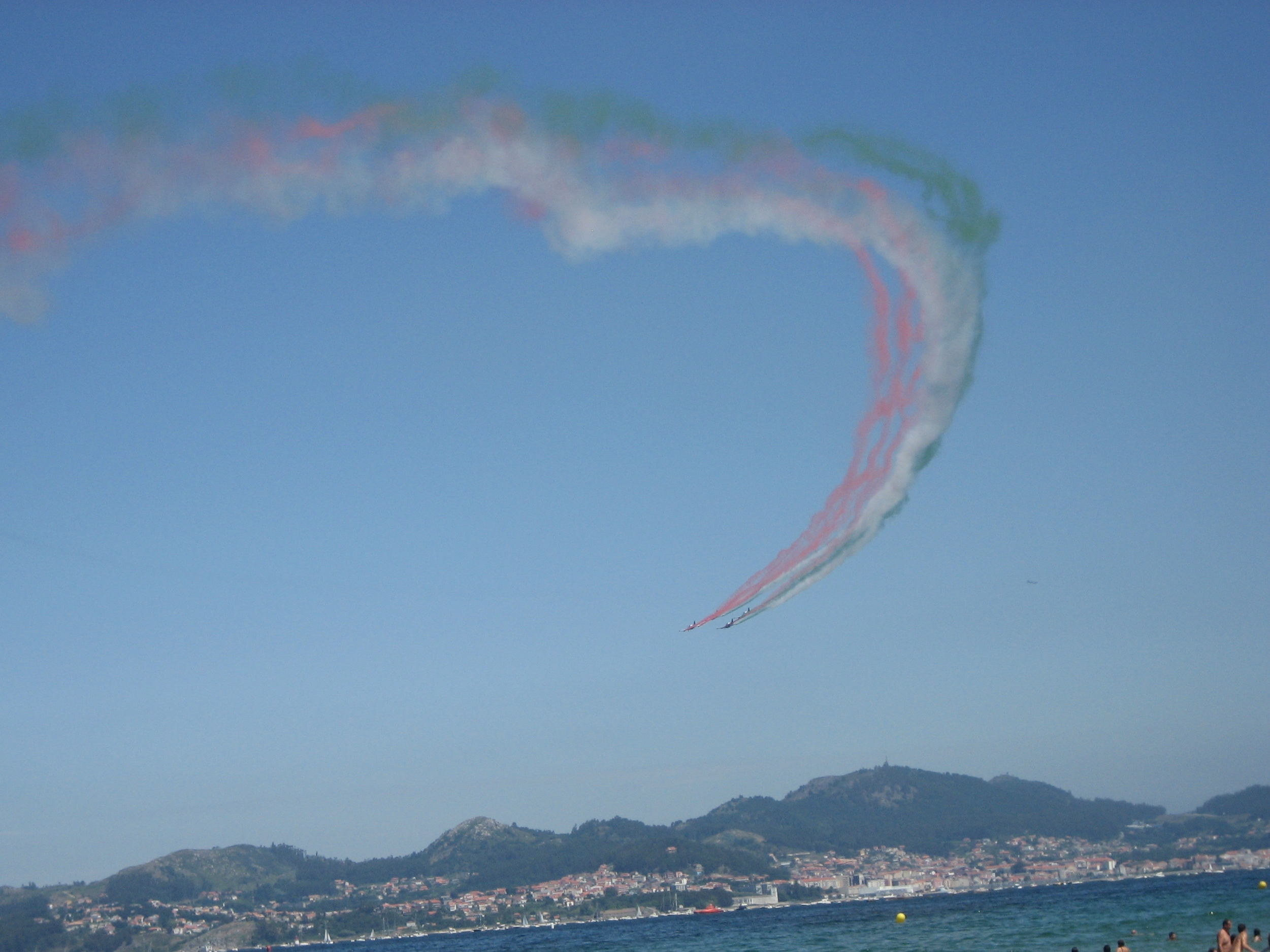 Pioneer Team en el Festival Aéreo de Vigo. 19 de julio de 2009